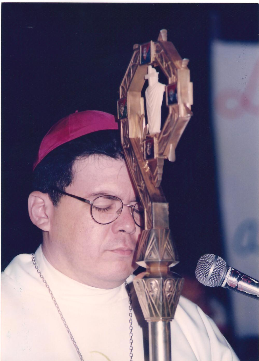 I Obispo de Carúpano.